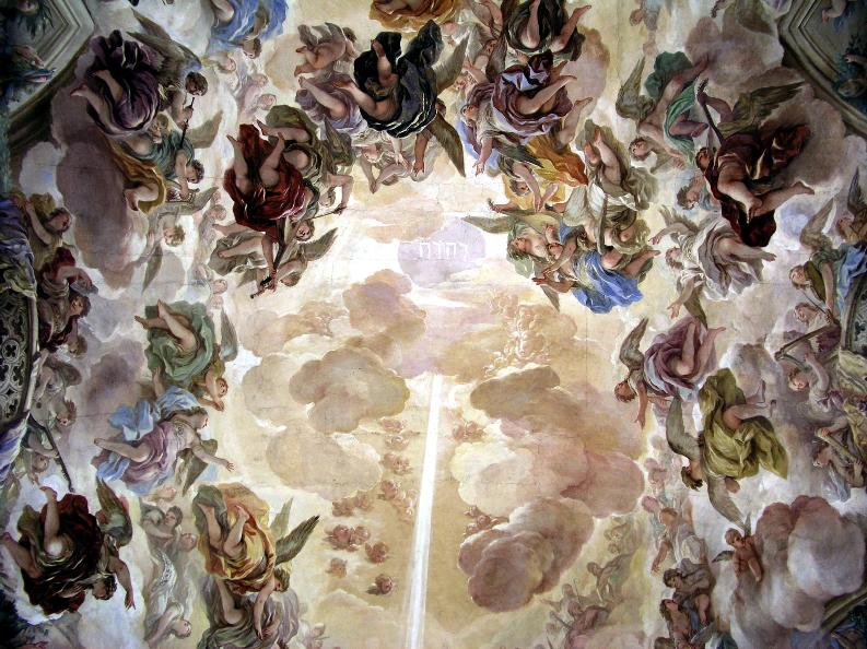 Pinturas en la cúpula de la sacristía de la Catedral de Toledo, España.